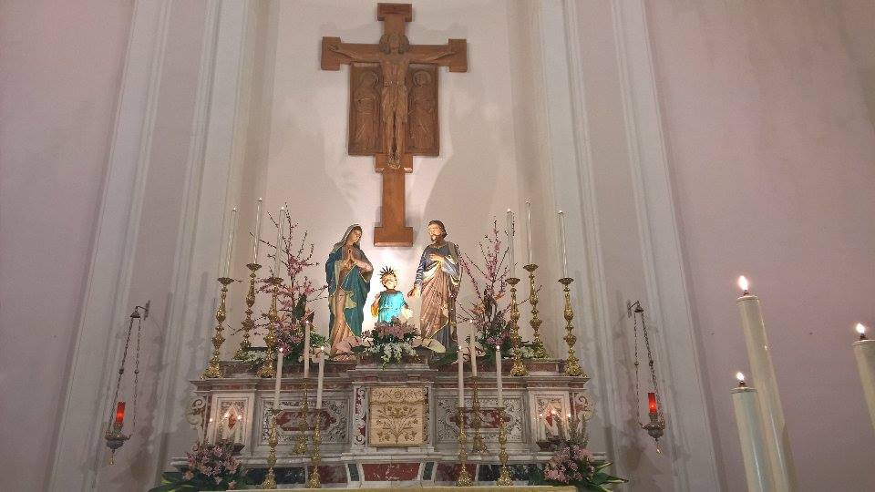 Altare maggiore Sacra Famiglia - Santa_Teresa_di_Riva